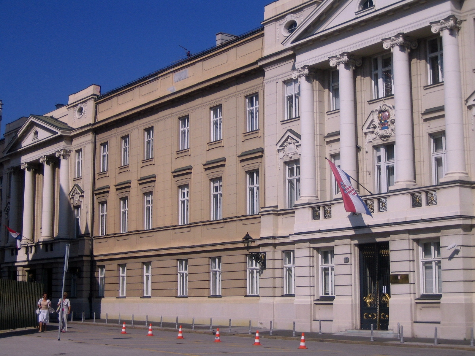 Palacio del Parlamento Croata.